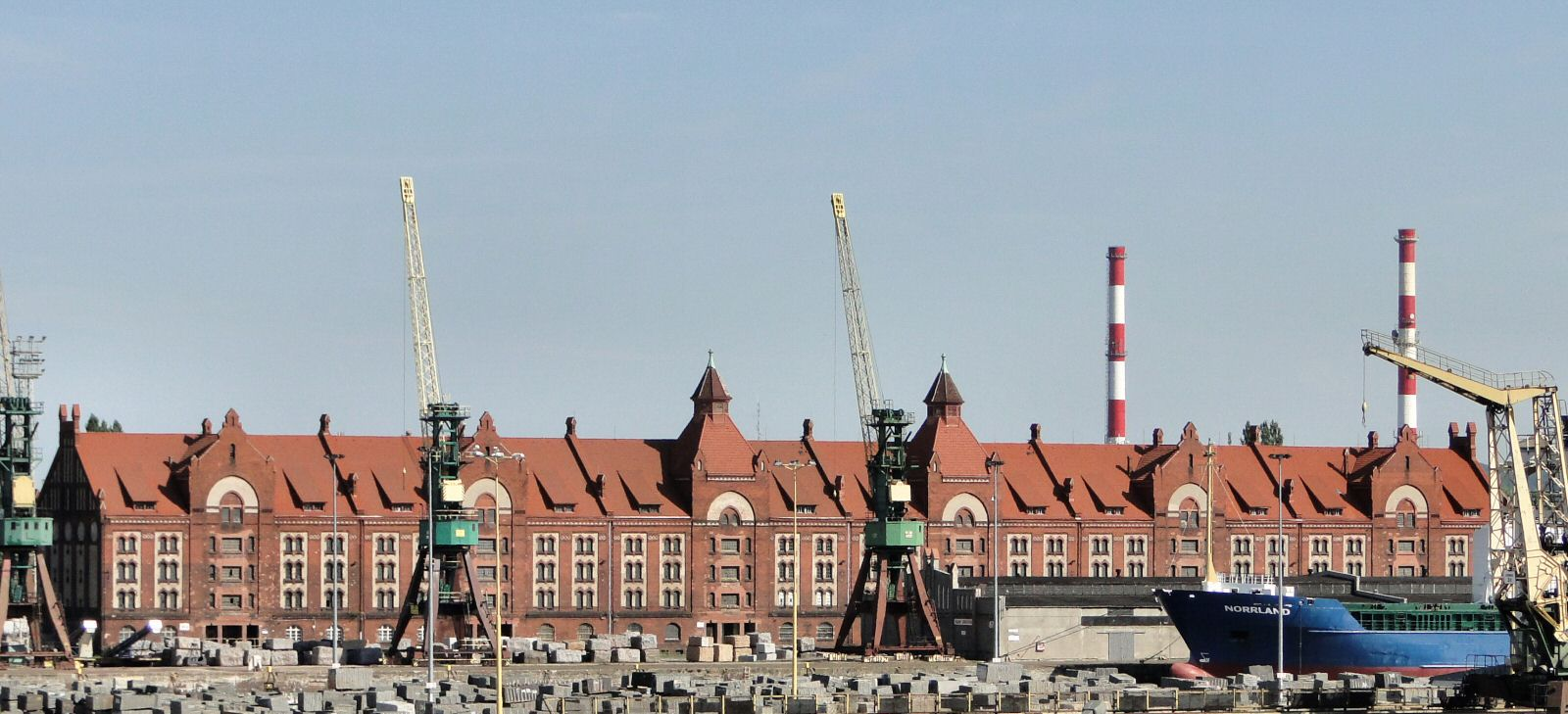 Budynek magazynu dawnego portu wolnocłowego w Szczecinie (zabytek nr 1180)